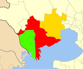 Χάρτης με τις δημοτικές ενότητες του Δήμου Δέλτα στην Περιφέρεια Κεντρικής Μακεδονίας.